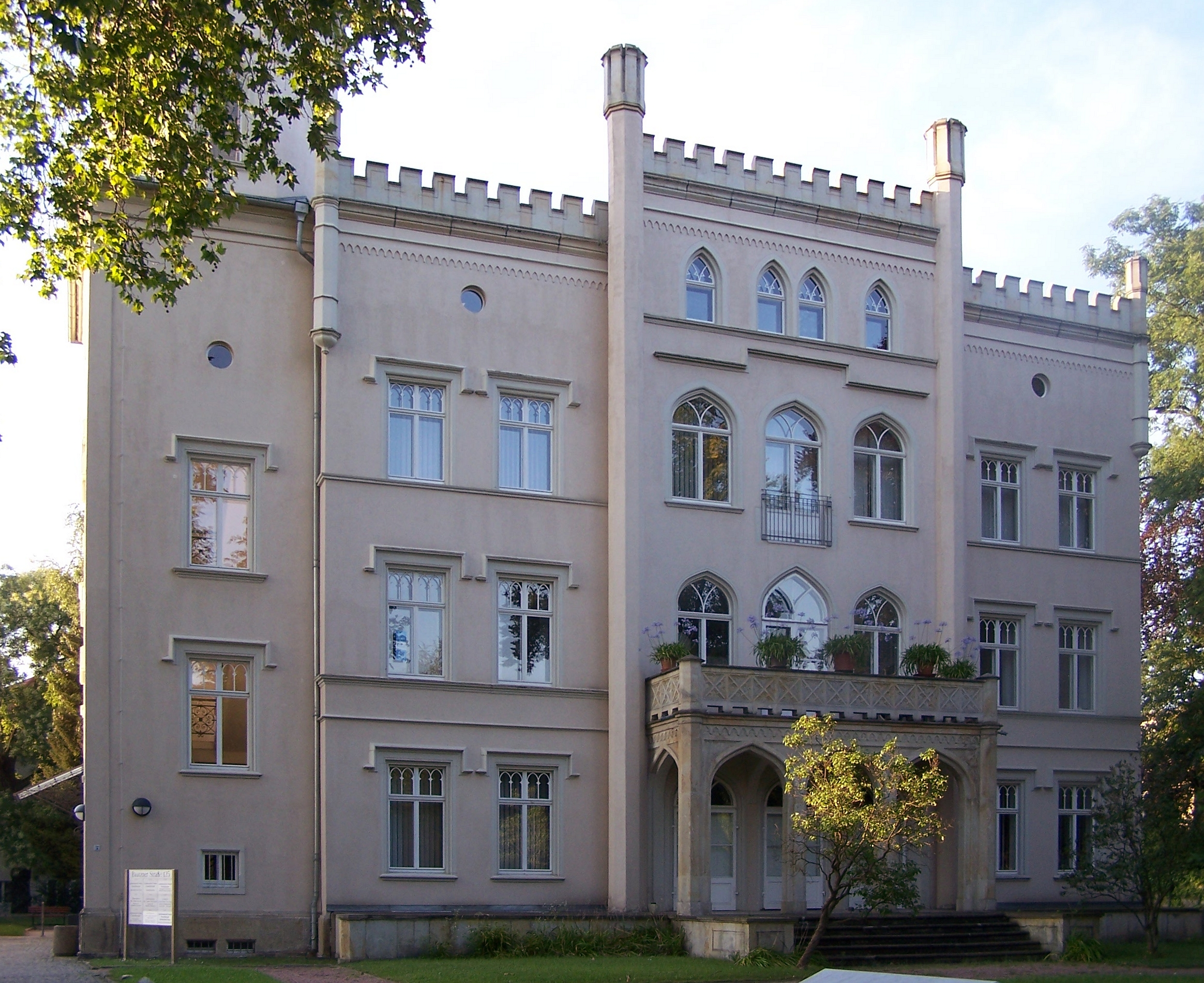 Haus Bautzner Straße 125 (Dresden)